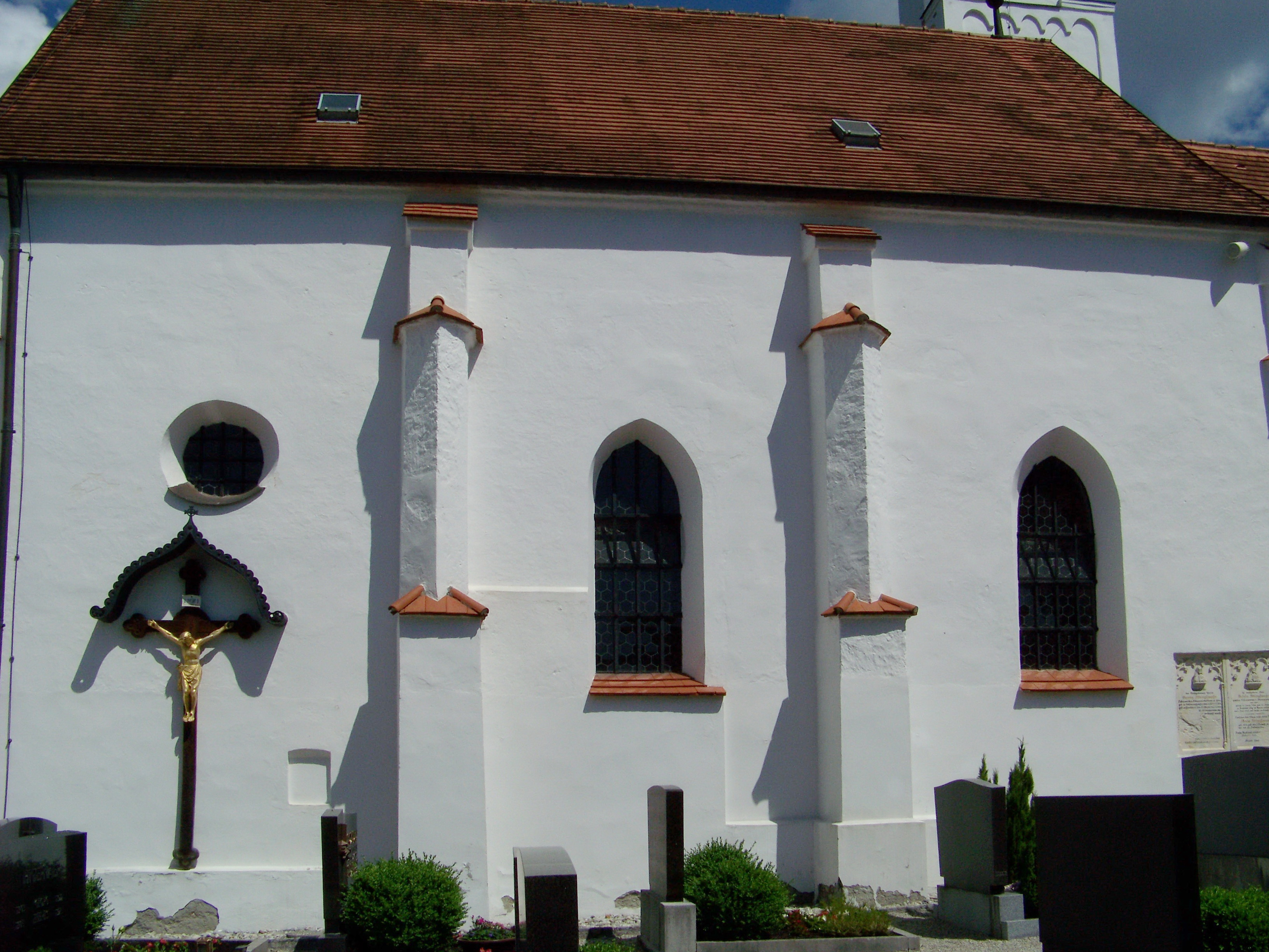 Altdorf bei Landshut. Pfettrach, Pfeffenhausener Straße 21. Katholische Filialkirche St. Othmar, Tor und Seelenhaus. Saalkirche mit eingezogenem Chor, um 1500. Barockisiert. Gliederung durch Strebepfeiler am Langhaus. Am Chor Dachfries und Dreieckslisenen. Nordseitig Chorflankenturm, mit Geschossgliederung und Blendbögen.